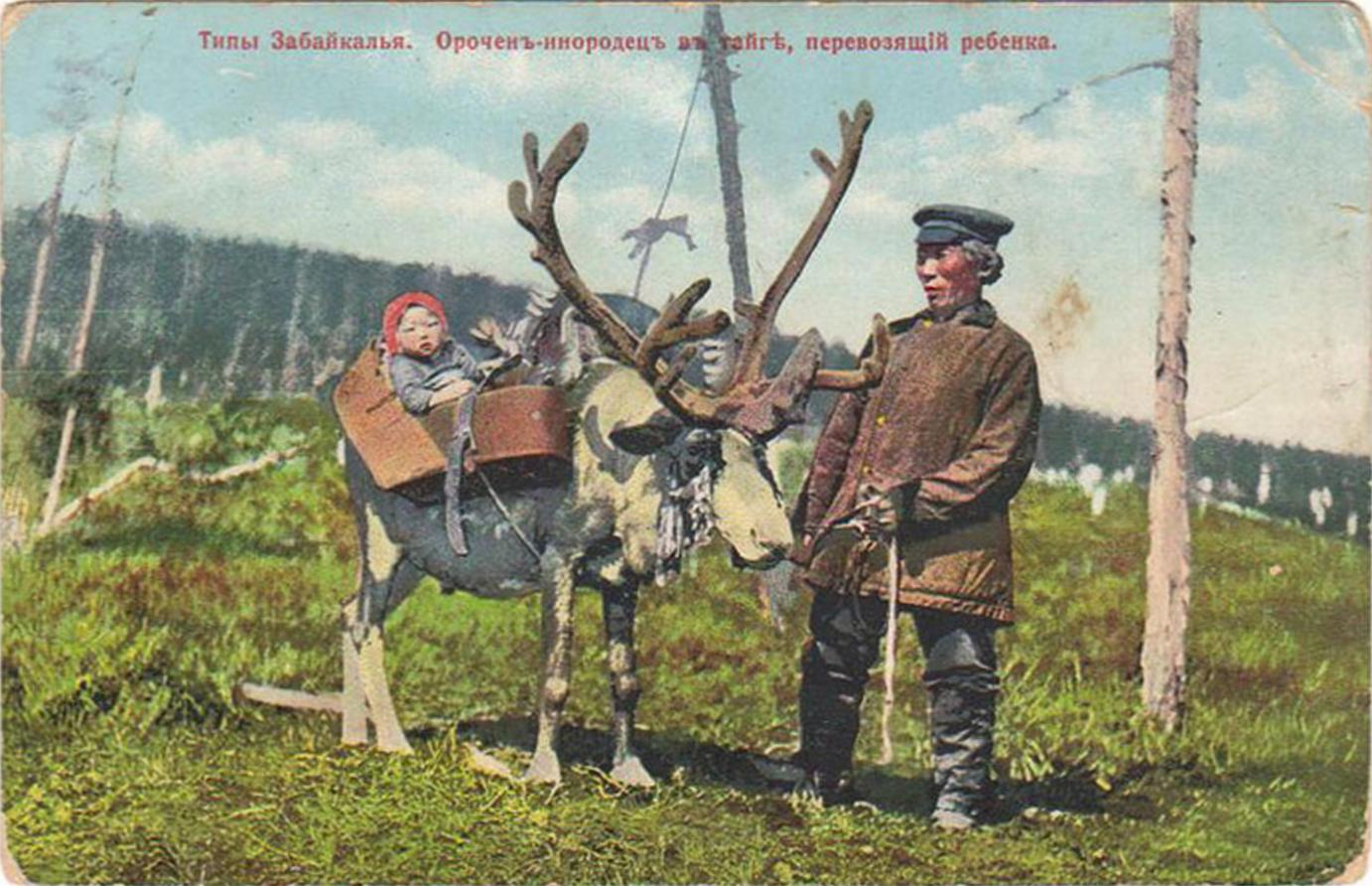 Орочен в тайге, перевозящий ребенка. Открытка